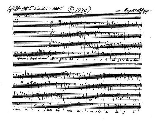 Mozart: Antiphon “Quaerite primum regnum Dei” October 9, 1770, Bologna